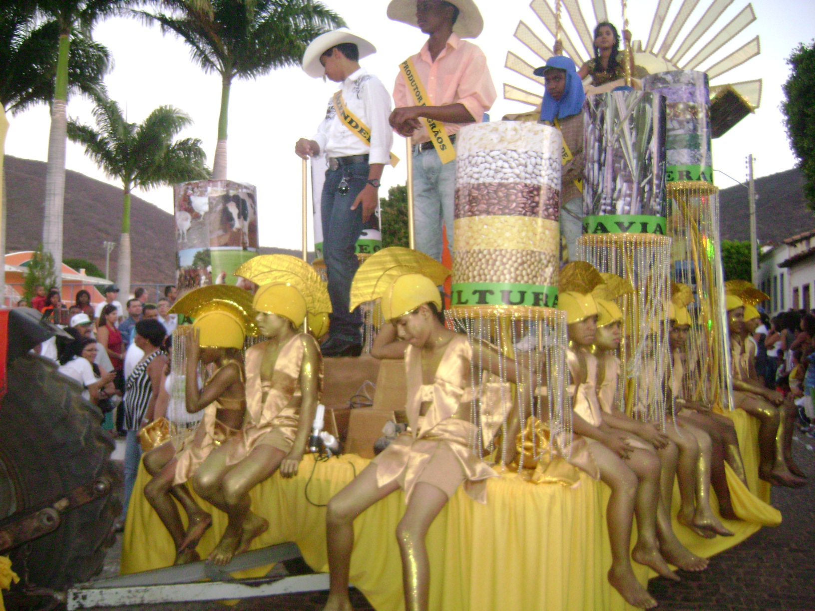 Desfile Civico alegorico em Palmas de Monte Alto-BA